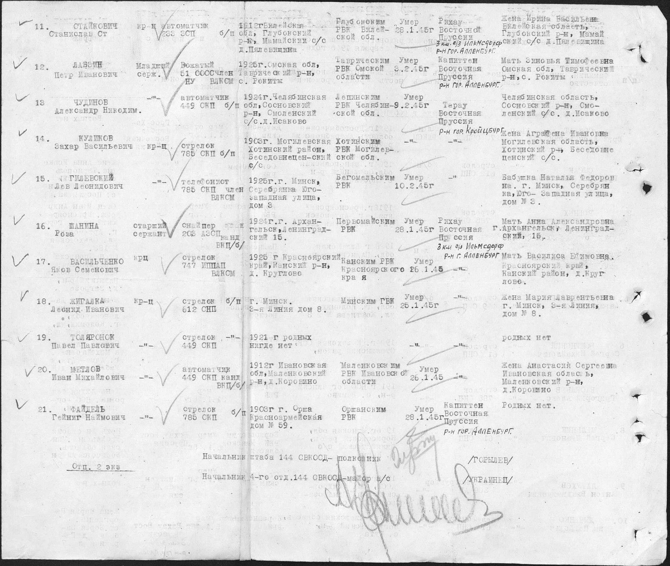 Страница №4 из именного списка №3 на умерших от ран в 205 МСБ 144 стрелковой Виленской Краснознаменной ордена Суворова дивизии за период с 25 января по 10 февраля 1945 года